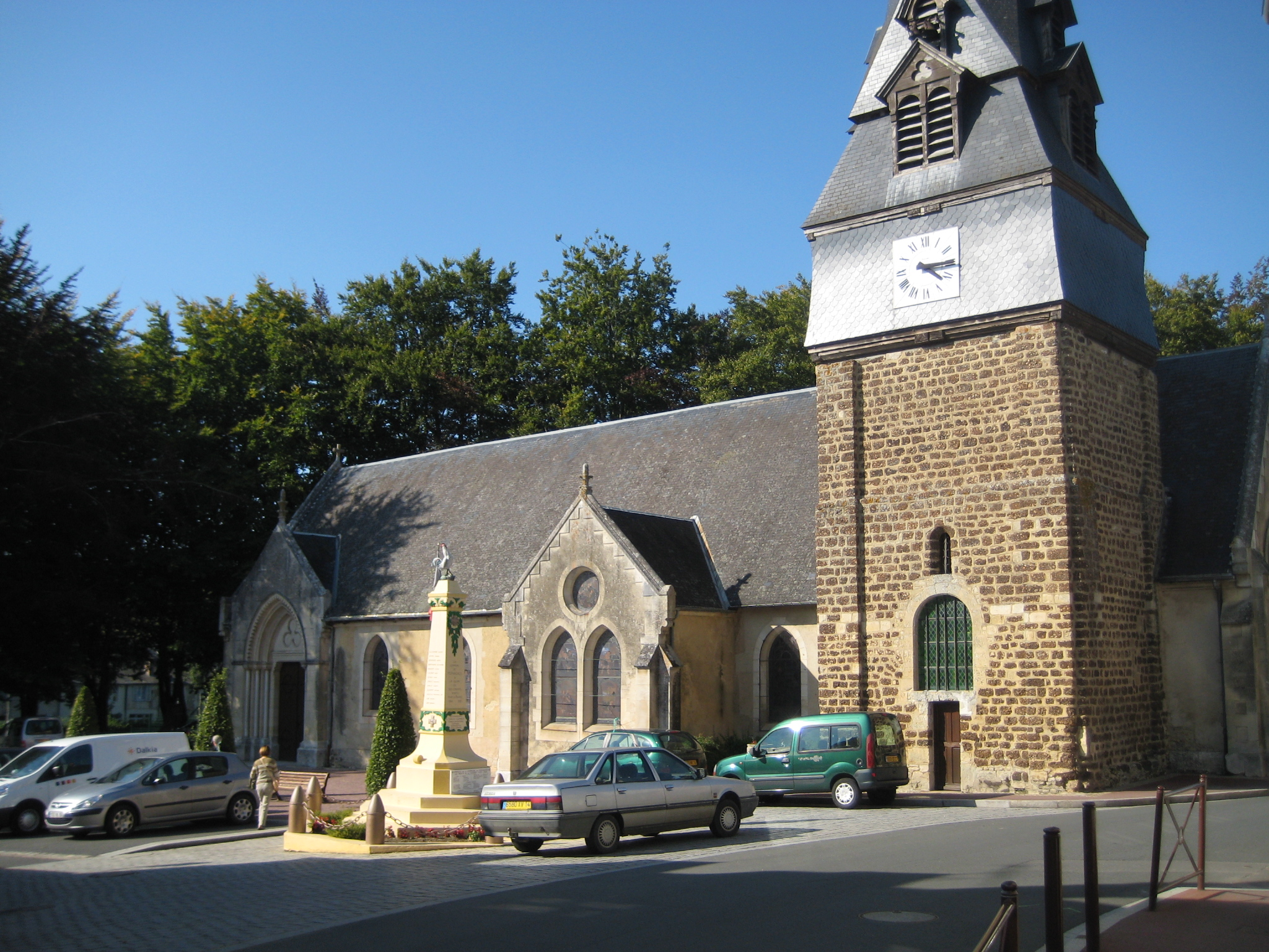 Eglise de Fervaques